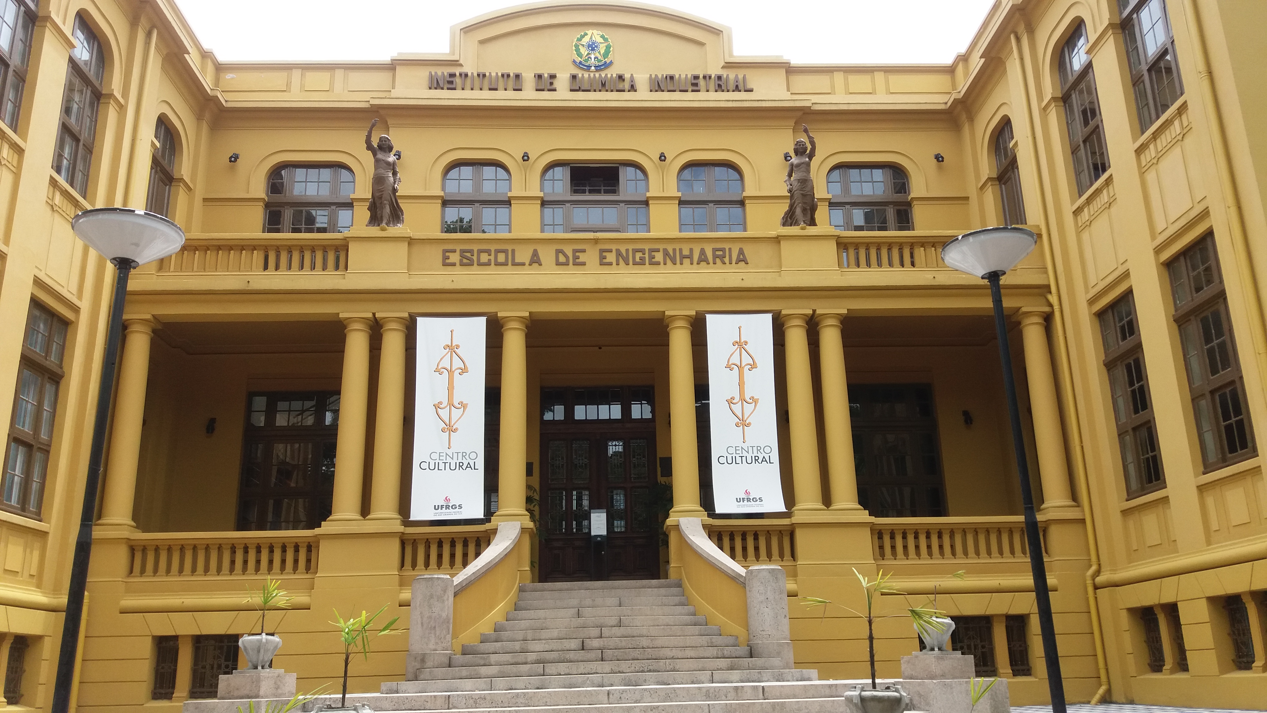 Antigo prédio do Instituto de Química da Universidade Federal do Rio Grande do Sul, em Porto Alegre, RS, Brasil.